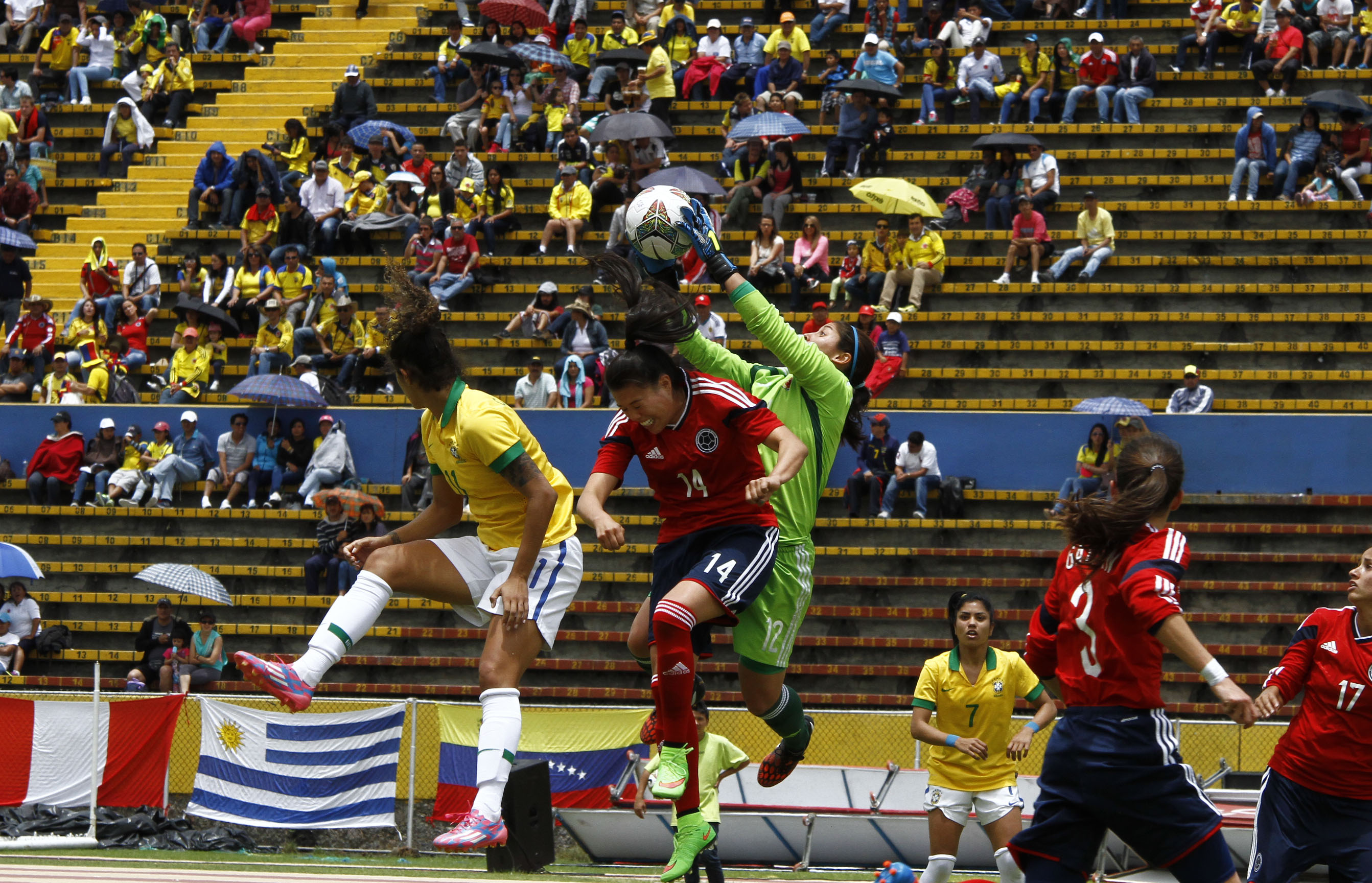 Quito, 28 sep (Andes).- La selección brasileña femenina de fútbol se proclamó Campeona de la Copa América de Fútbol Ecuador 2014. Foto: Micaela Ayala V./Andes